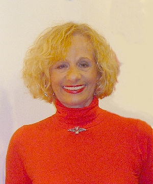 Hedy Klineman 2012